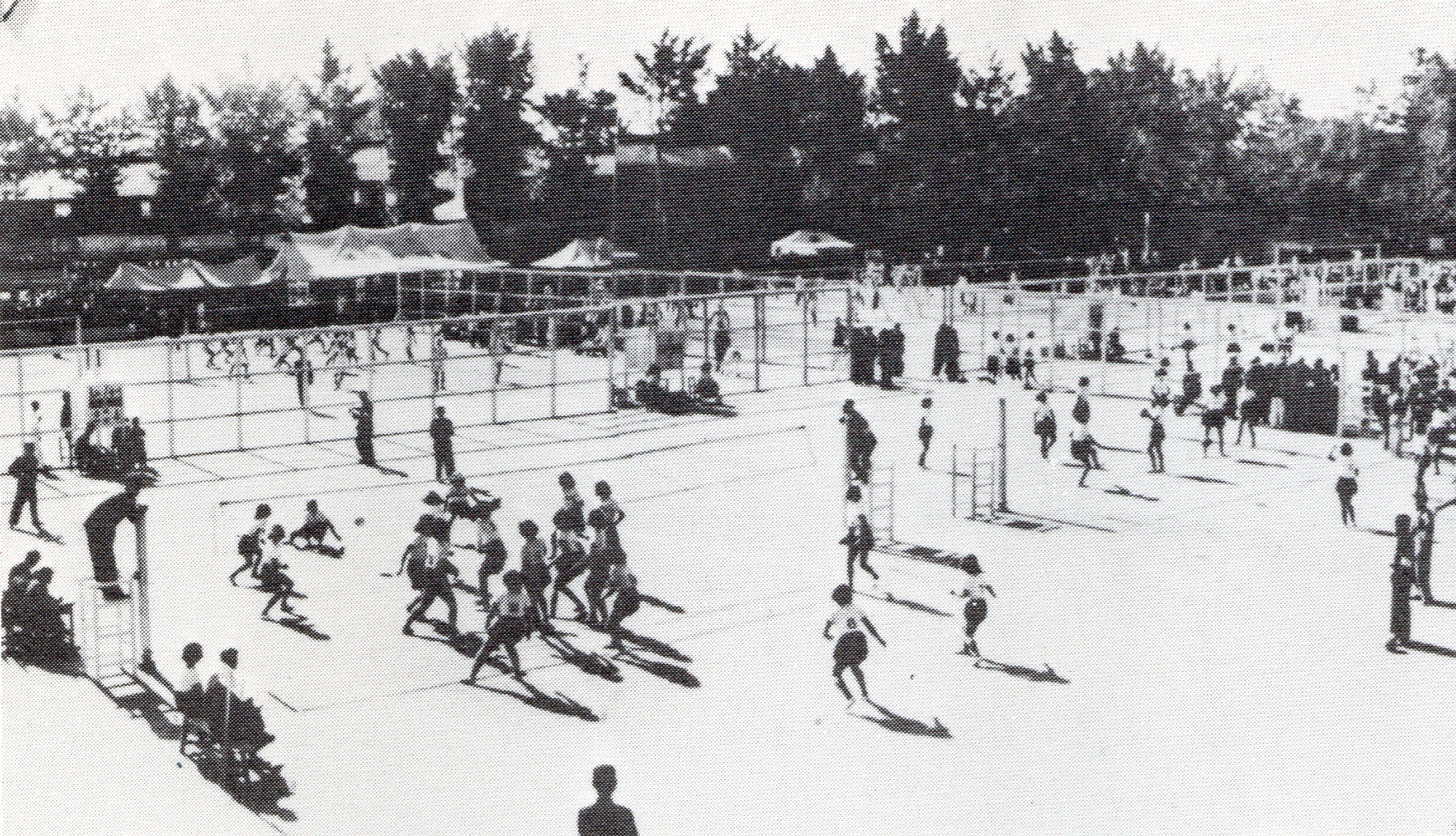 第5回国民体育大会 バレーボール競技大会（1950年10月28日から5日間開催）